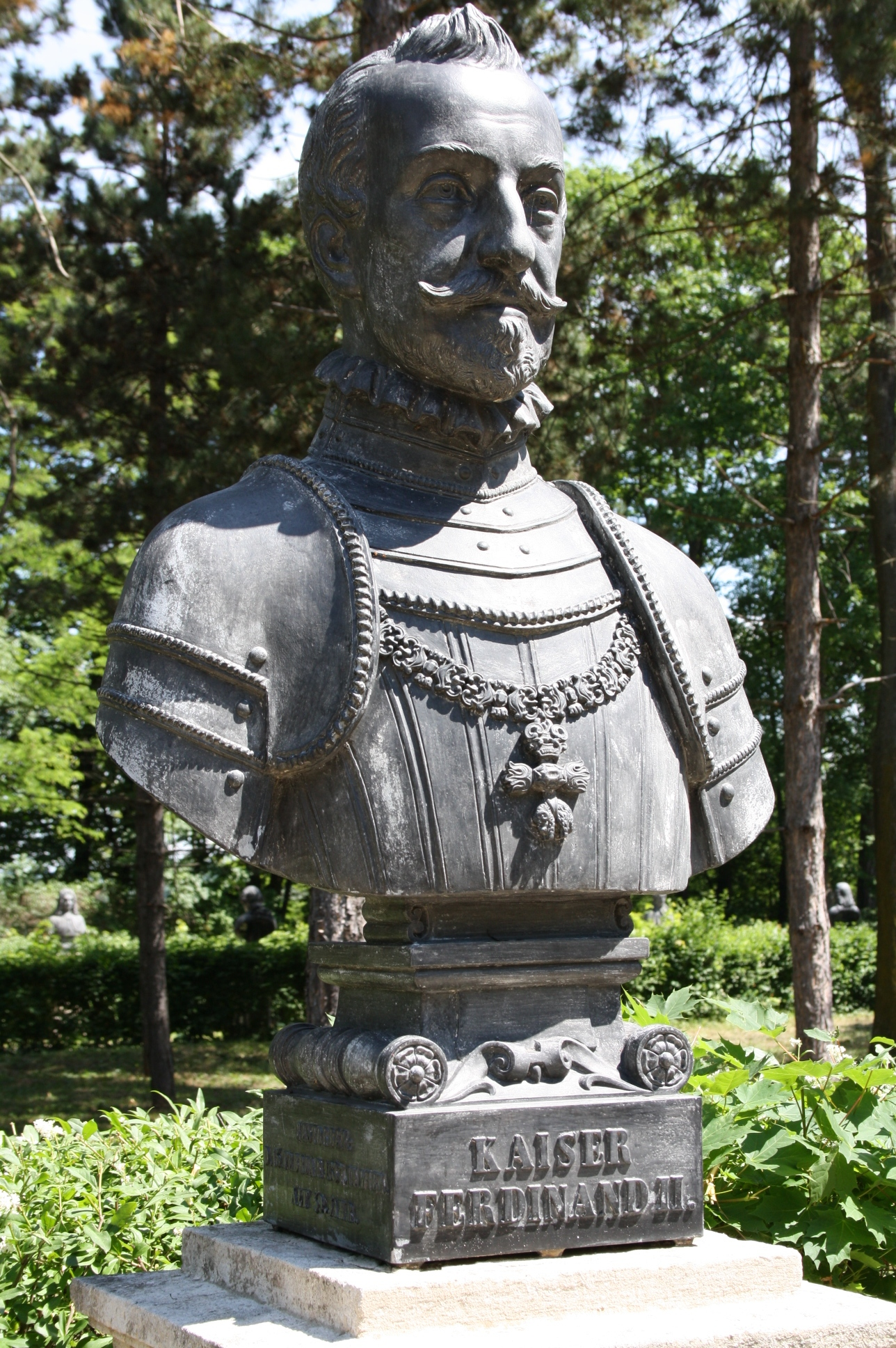 Büste in der Gedenkstätte Heldenberg (Niederösterreich)